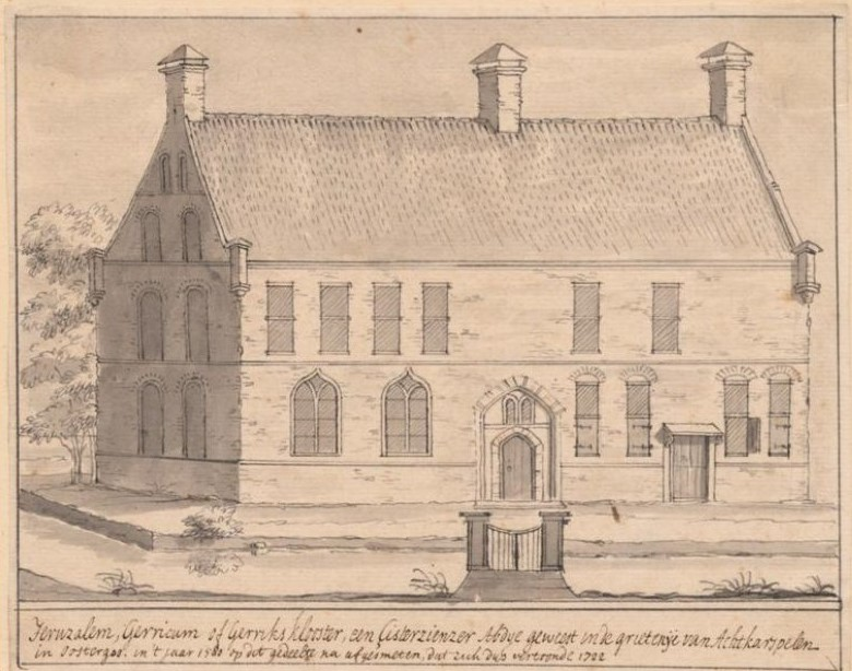 Tekening uit 1722 van de hervormde kerk van Gerkesklooster, gemaakt door Jacobus Stellingwerff. Het gebouw deed eerder dienst als brouwerij van het Gerkesklooster.